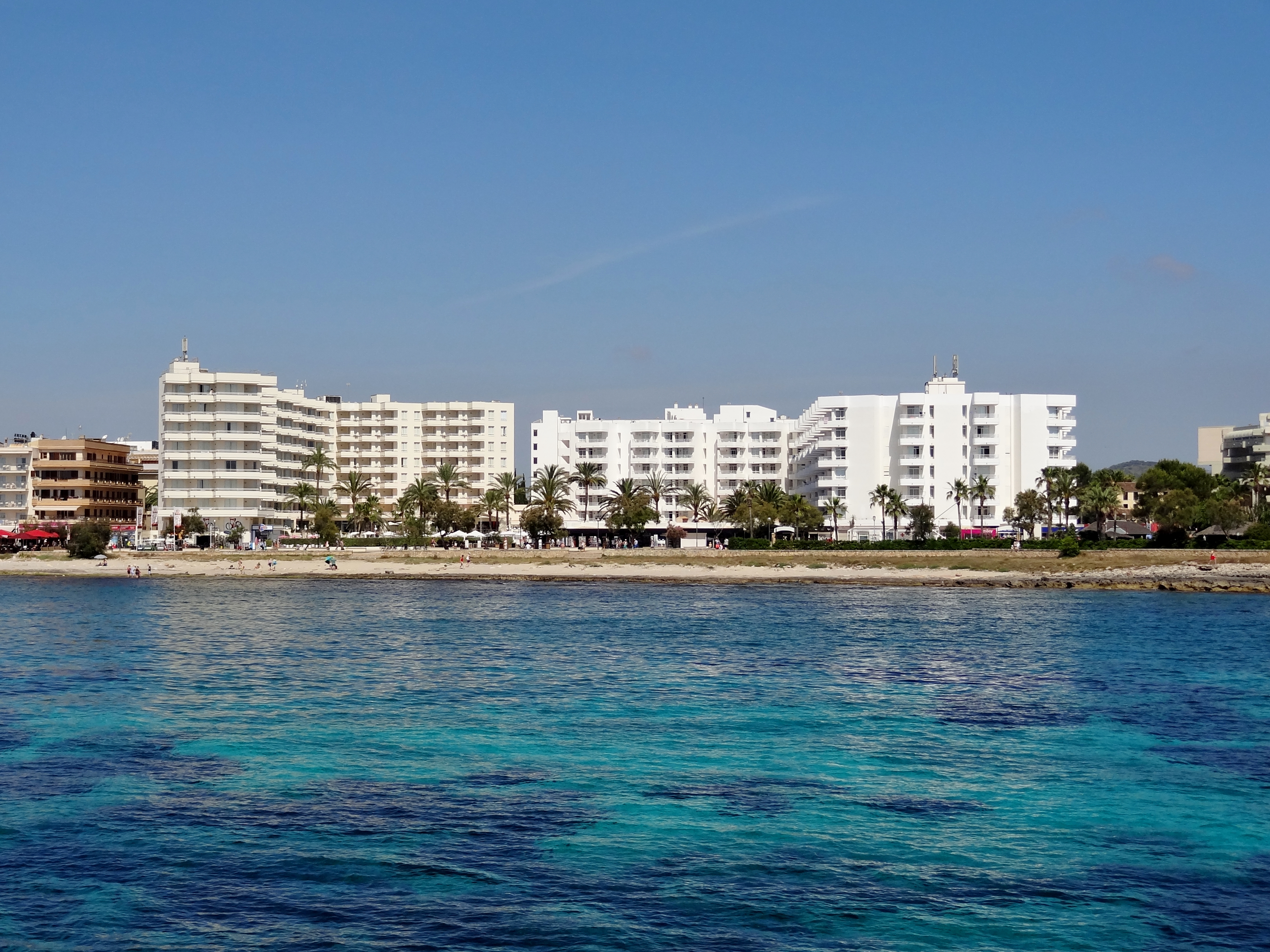 Strand von sa Punteta, auch ses Planeres, in Sa Coma in der Gemeinde Sant Llorenç des Cardassar, Mallorca, Spanien